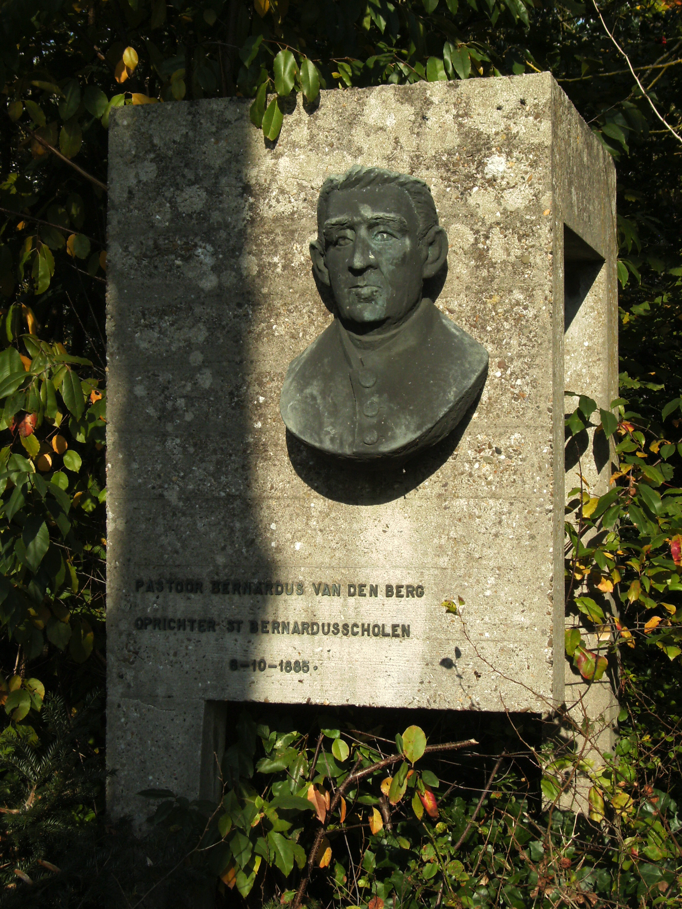 Pastoor Bernardus van den Berg, Stichter St Bernardusscholen, 8-10-1985 Bij de ingang r.k. begraafplaats, Ceintuurbaan, Deventer